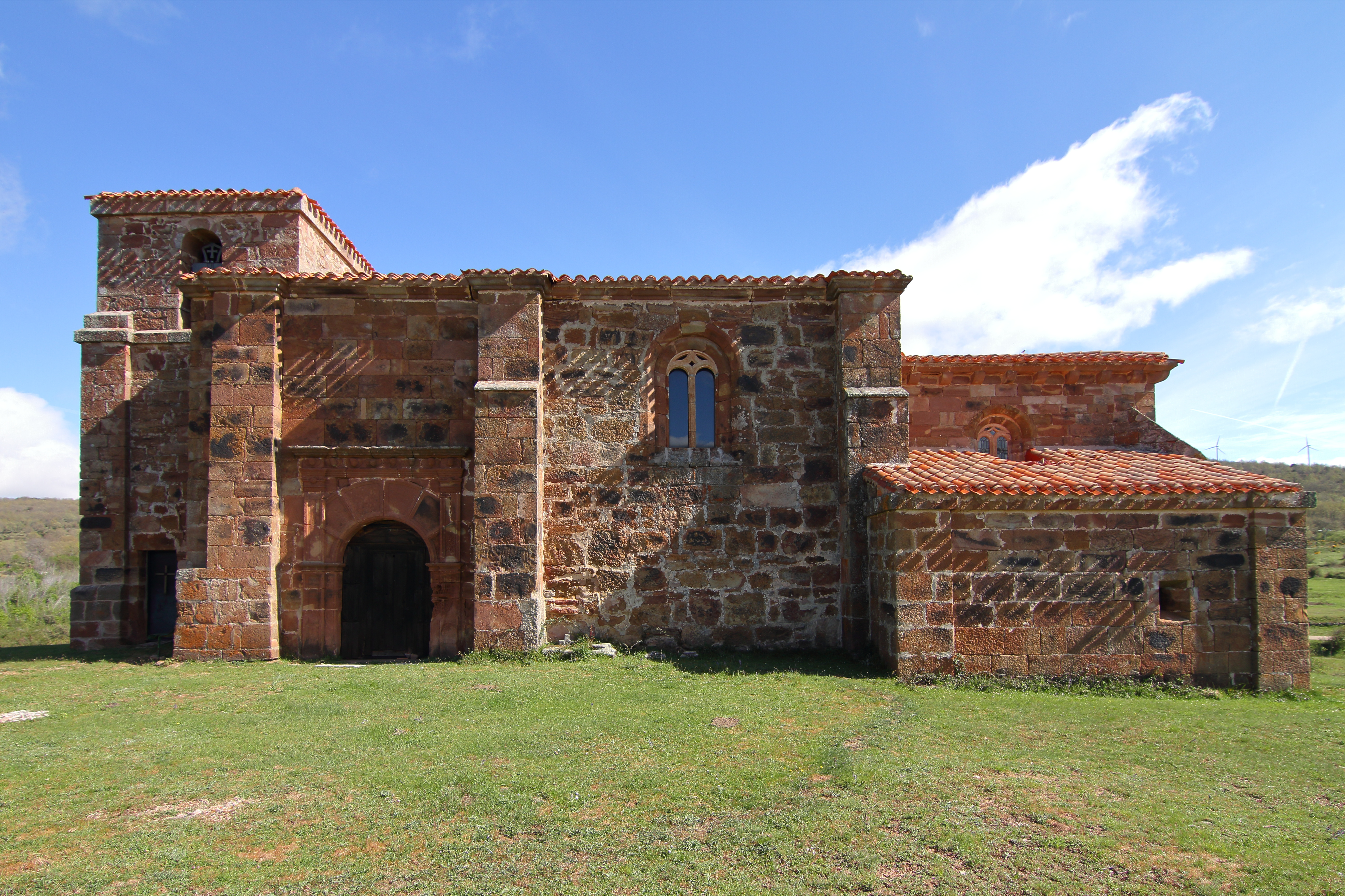 Villoruebo, Iglesia de la Asunción, 07